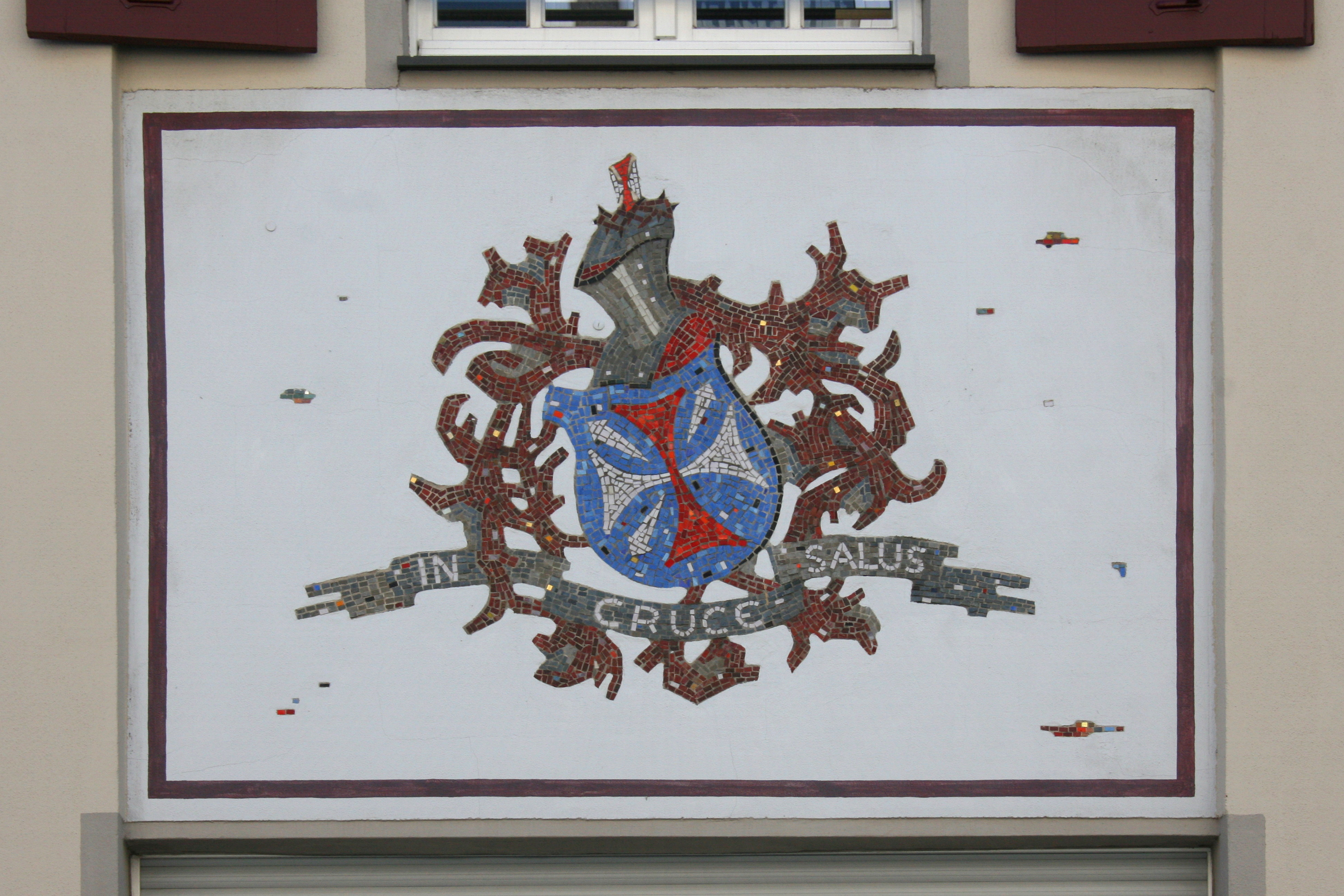 Kloster St. Ursula in Wuppertal